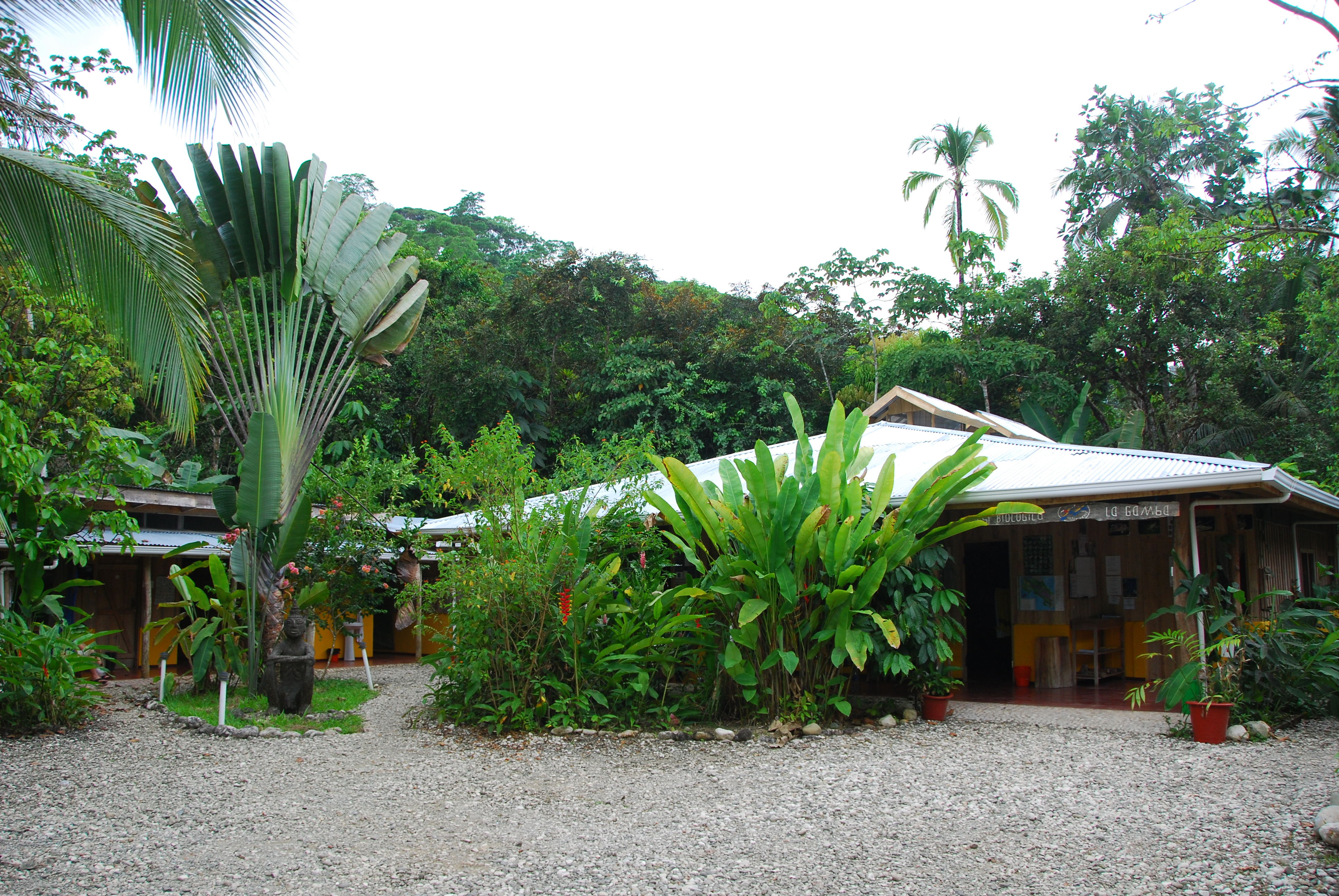 Das Haupthaus der Tropenstation La Gamba im Jahr 2012